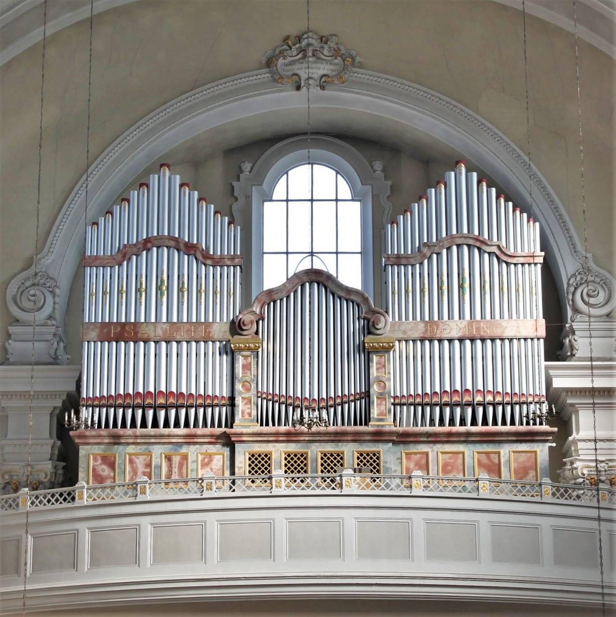 Orgel von St. Theresia in München (1976, W. Stöberl, III/42)